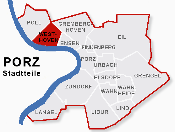 Lage des Stadtteils Westhoven im Stadtbezik Porz